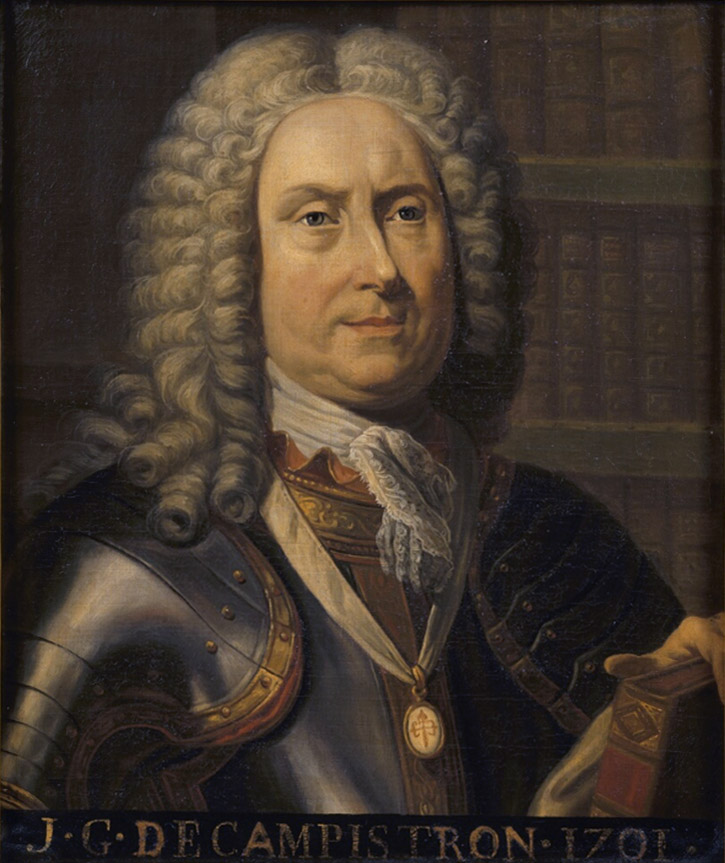 Il porte l'ordre de Saint-Jacques-de-l'épée